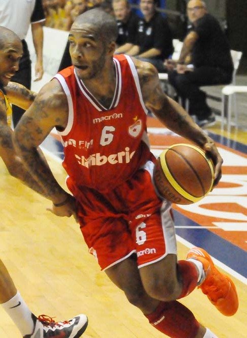 Adrian Banks